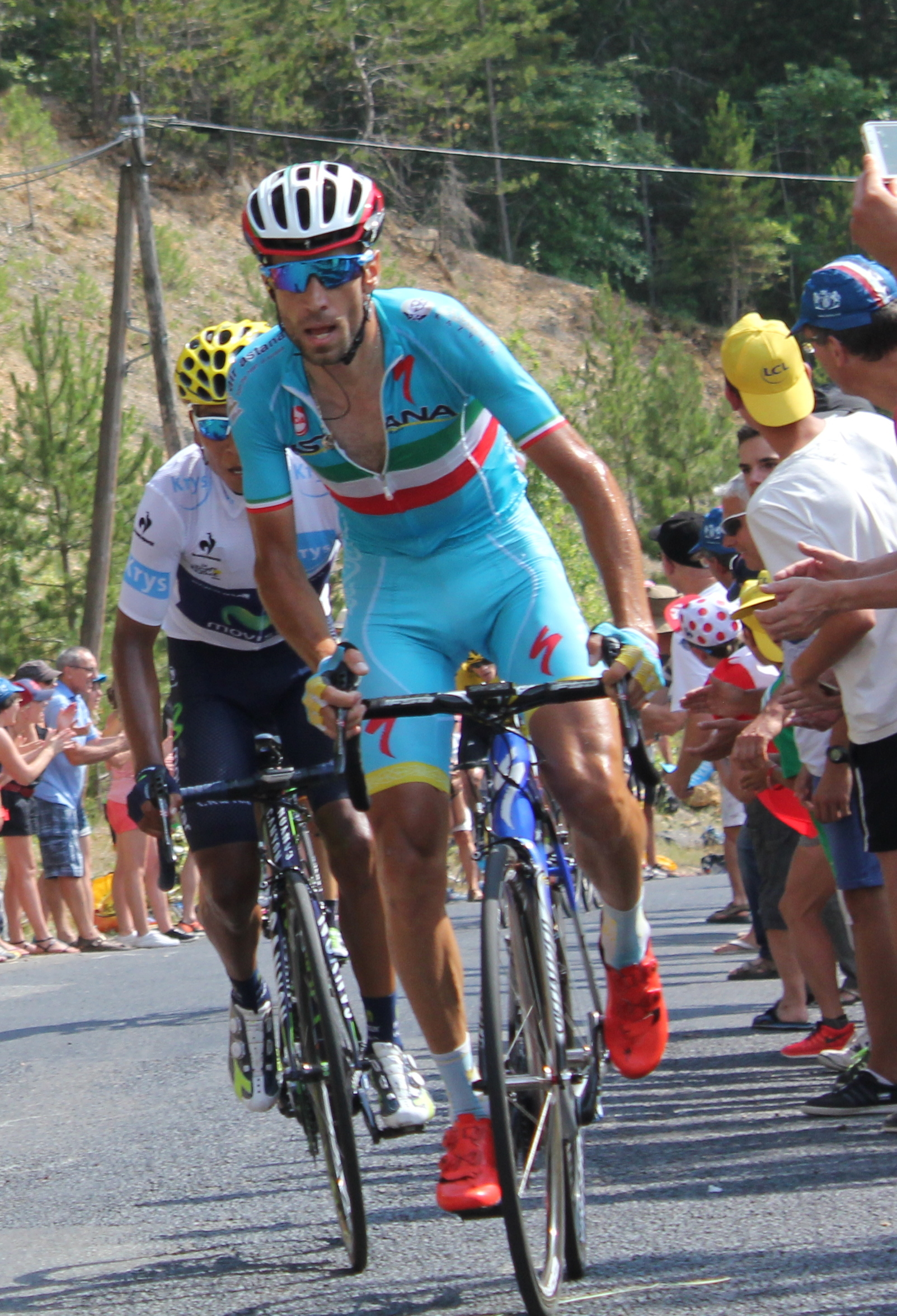 14e étape du Tour de France 2015 (Rodez-Mende), accélération de Vincenzo Nibali et Nairo Quintana à 4 km de l'arrivée